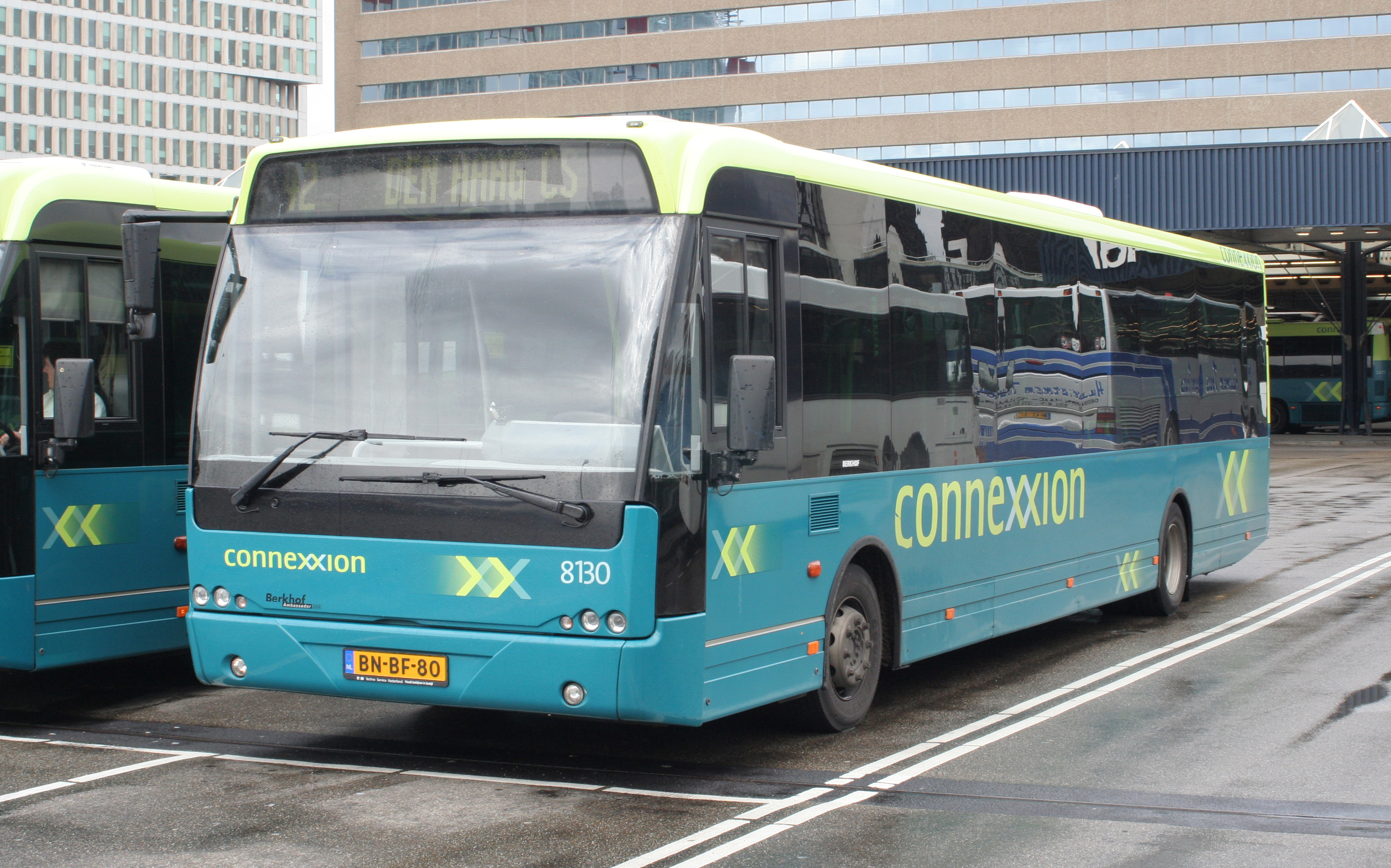 Een Connexxionbus in Den Haag. Deze bus ging later naar GVU.